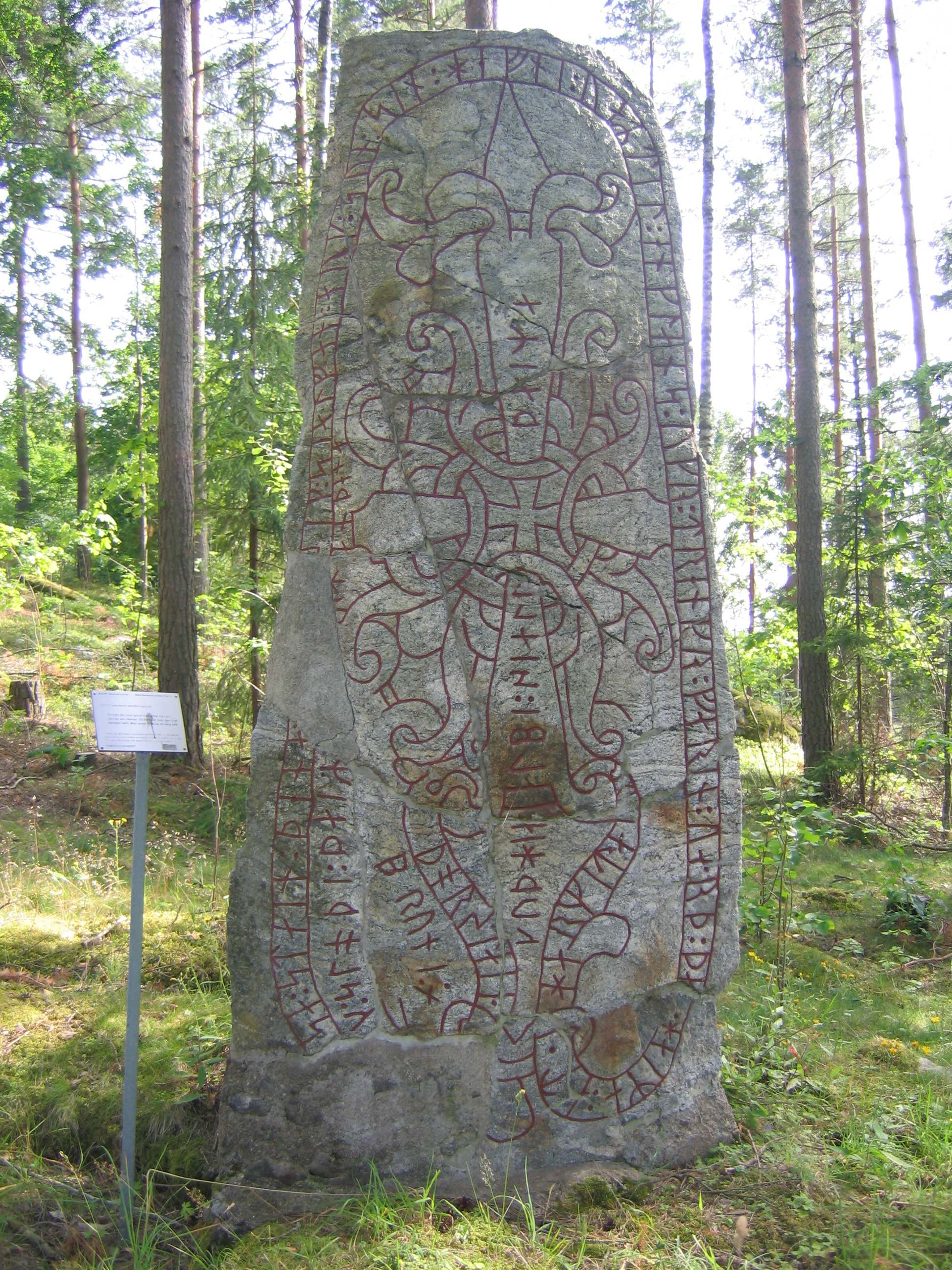 Runstenen Sö 55 i Bjudby, Blacksta, Flen.